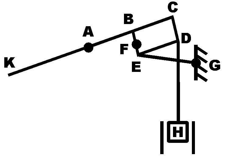 Watt-parallel-motion